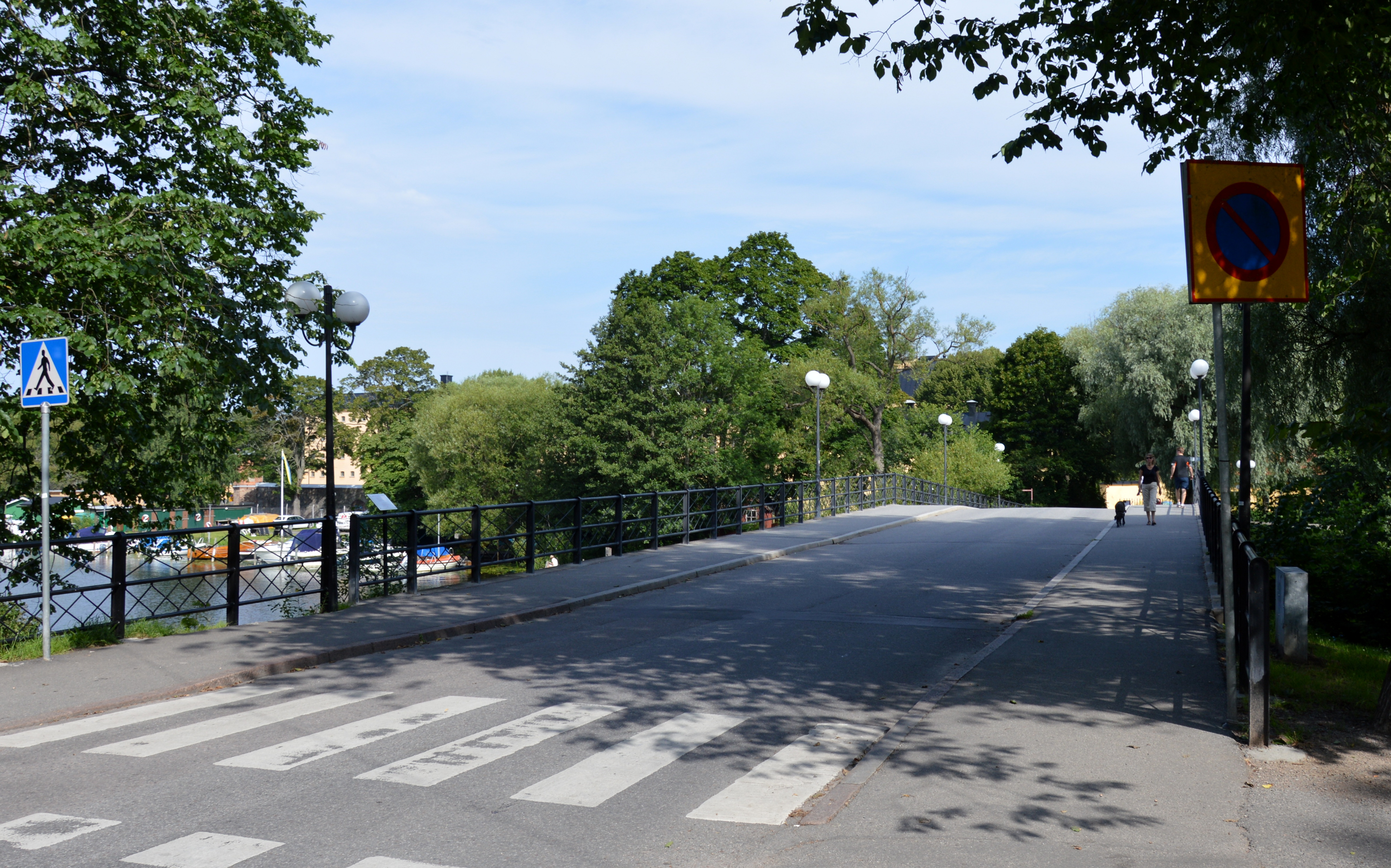 Langholmsbron